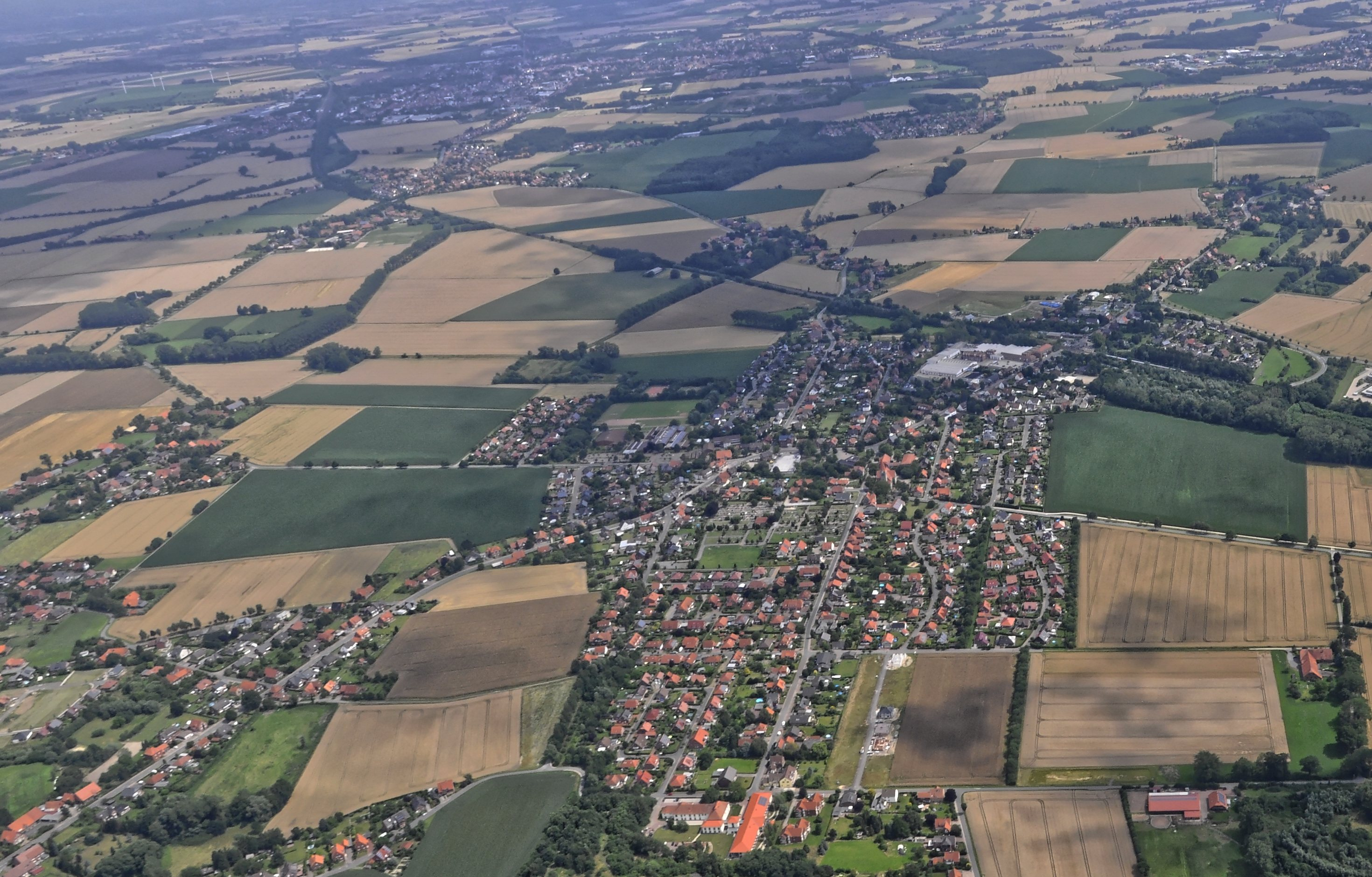 Bilder vom Flug Nordholz-Hammelburg 2015: Helpsen